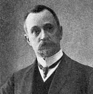 Крыжицкий, Константин Яковлевич